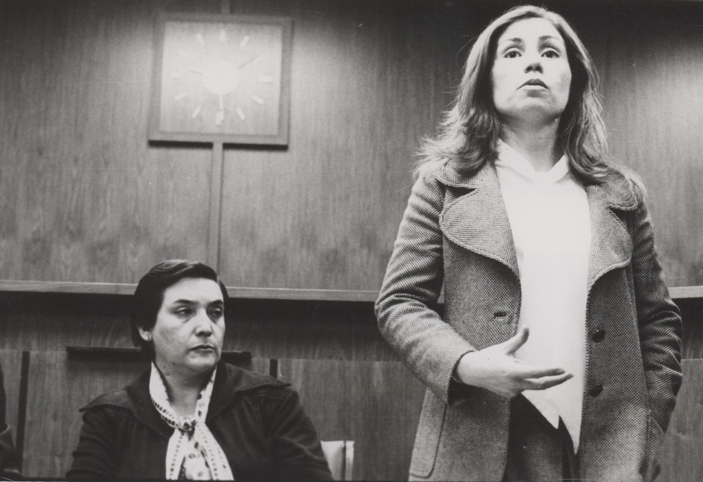 María Elena Carrera junto a Gladys Marín en Estados Unidos.